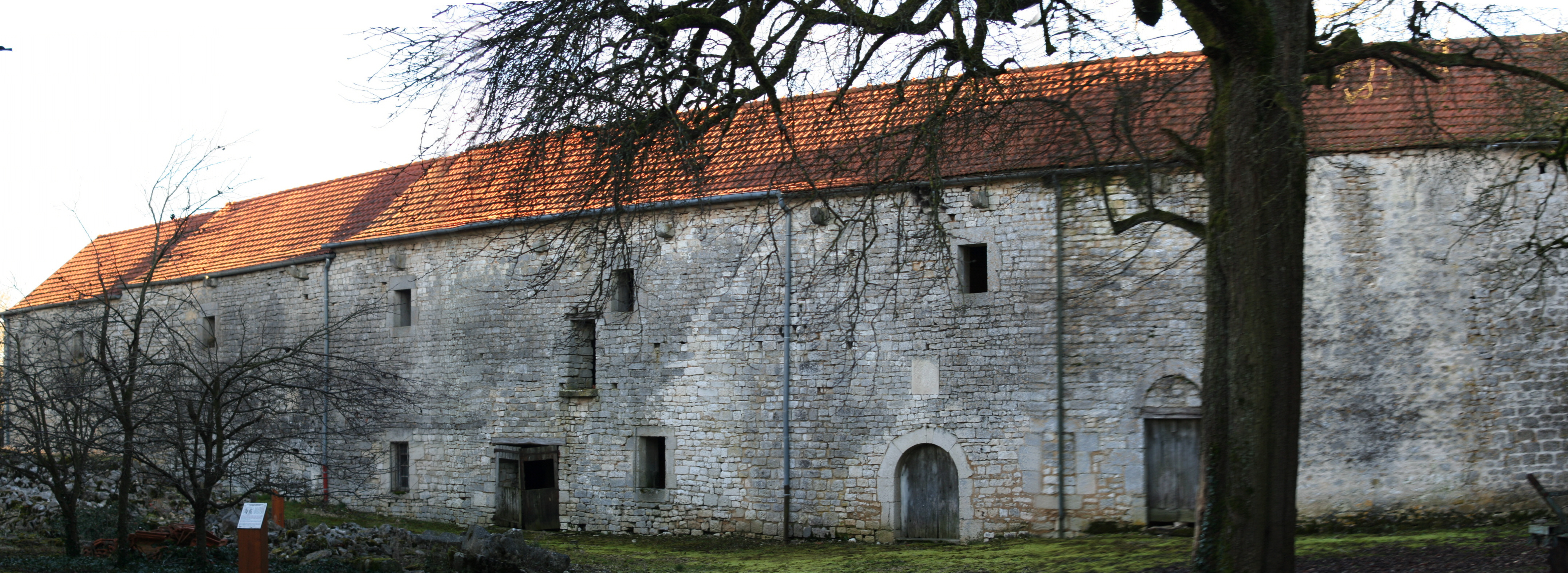 le bâtiment de l'Hotellerie de l'Abbaye de Mormant (Haute-Marne)